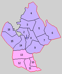 佐賀県西松浦郡の町村制時点の町村。